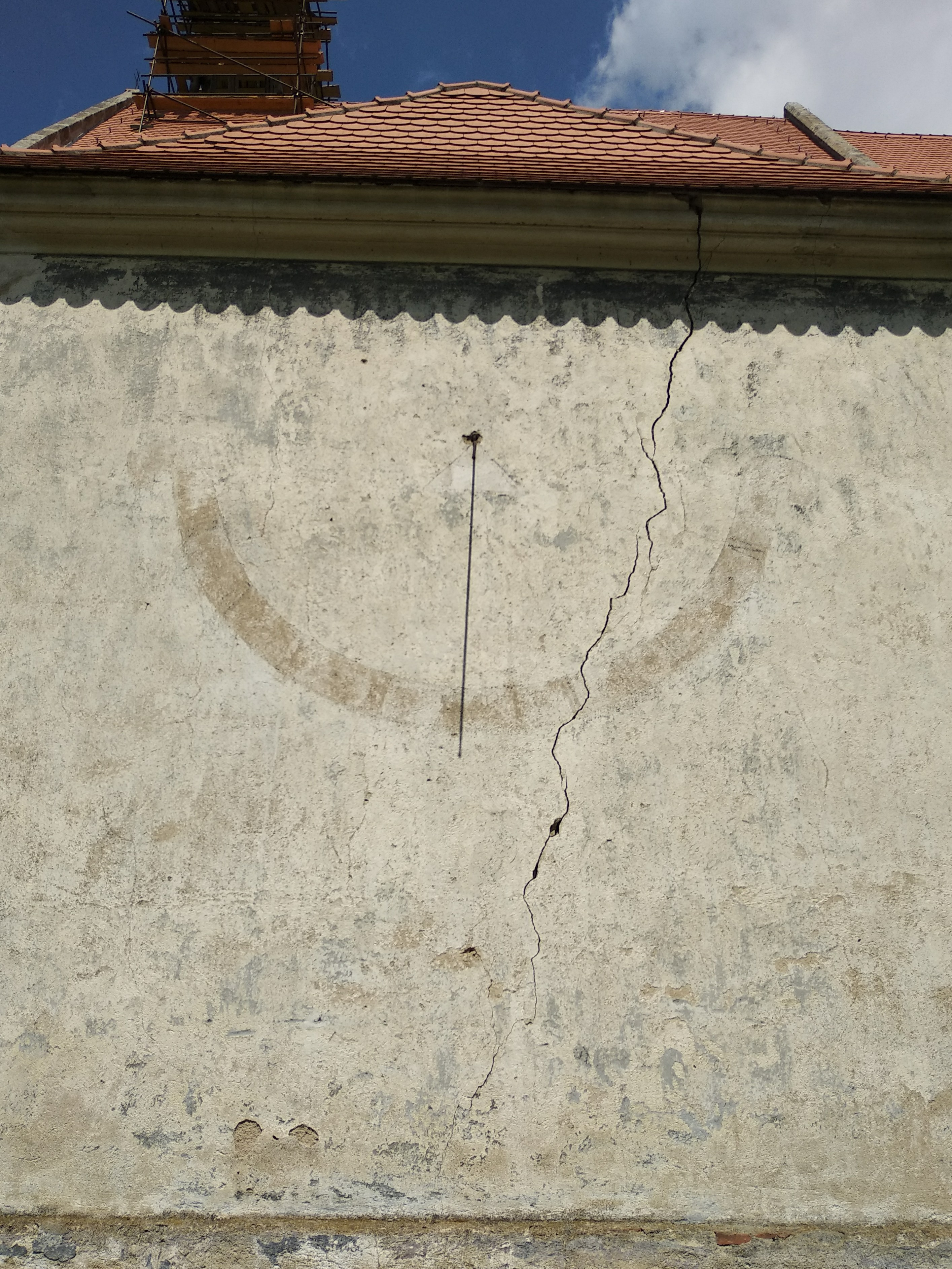 sluneční hodiny